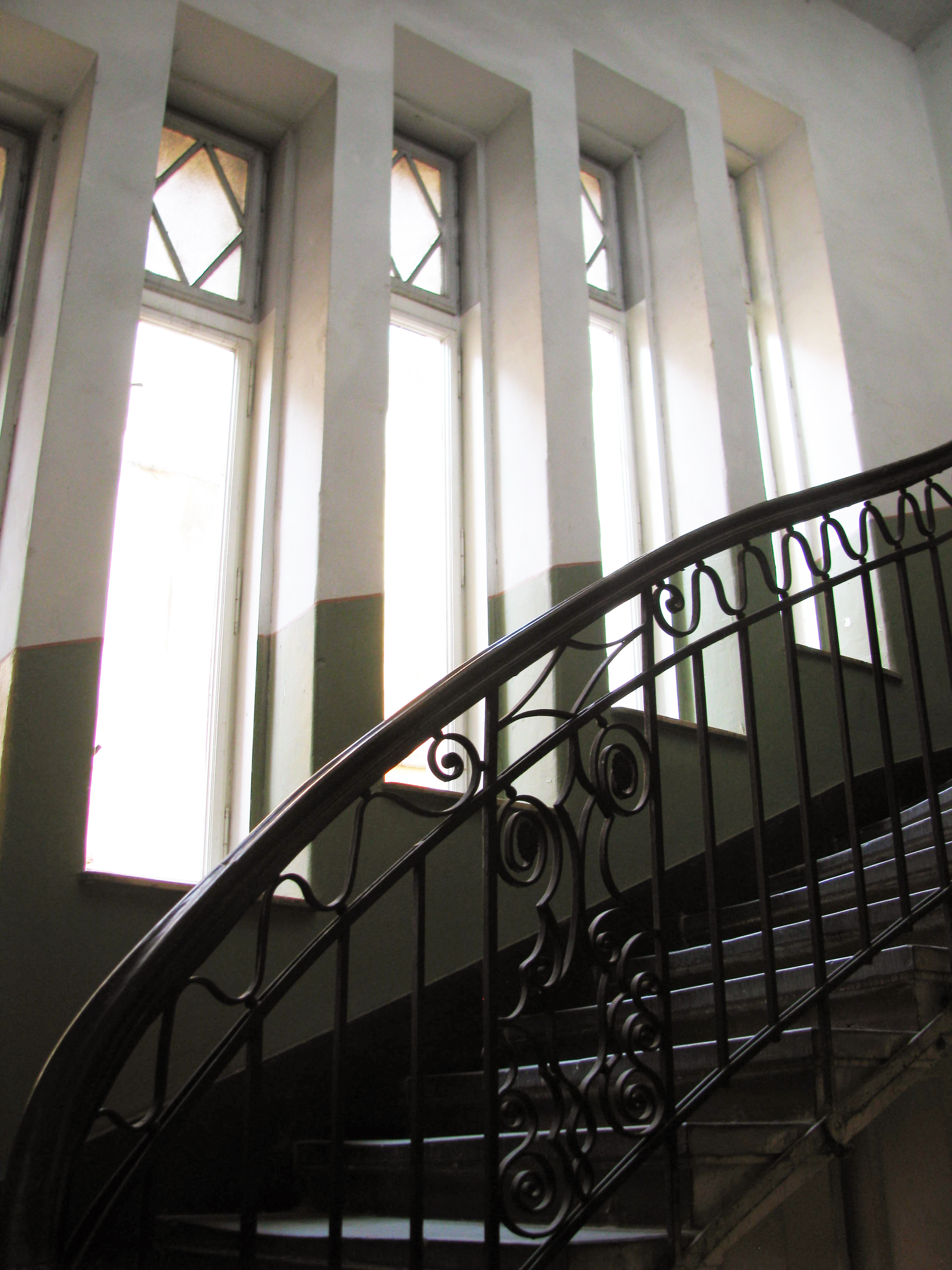 Будинок № 4 на вулиці Донцова у Львові.